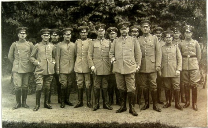 Das Hauptquartier des Oberbefehlshabers Ost. Folgende Offiziere sind auf dem Bild: Rittmeiser Steinicke, Hauptmann v. Waldow, Hauptmann Drück, Hauptmann Hofmann, Major v. Baehr, Generaleutnant Ludendorff, Major Caemmerer, Generalfeldmarschall v. Hindenburg, Rittmeister de la Croix, Oberstleutnant Hoffmann, Oberstleutnant Rostock, Major v. Bockelberg, Rittmeister Freiherr v. Maltzahn, Prinz Joachim v. Preußen (der als Einziger die Uniform richtig trägt)